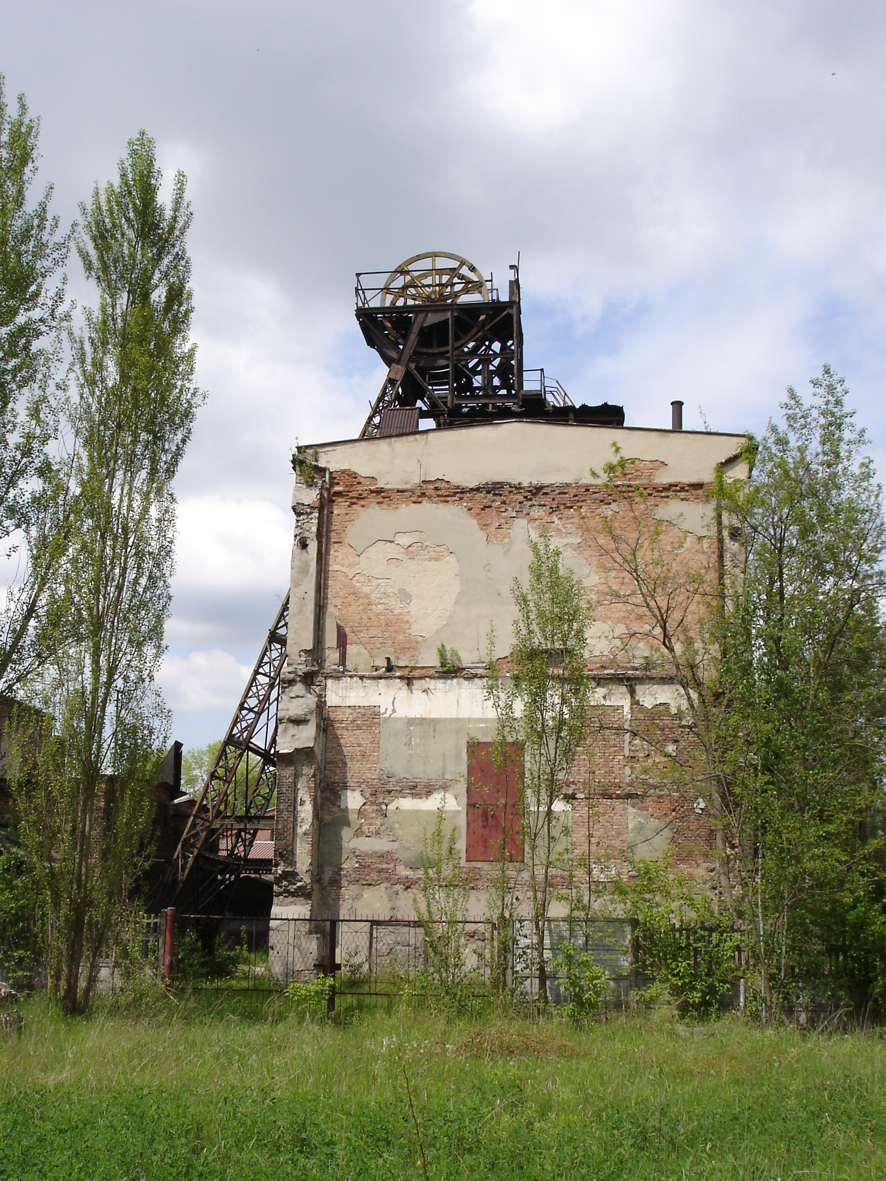 Wieża wyciągowa szybu I kopalni węgla kamiennego Saturn w Czeladzi.